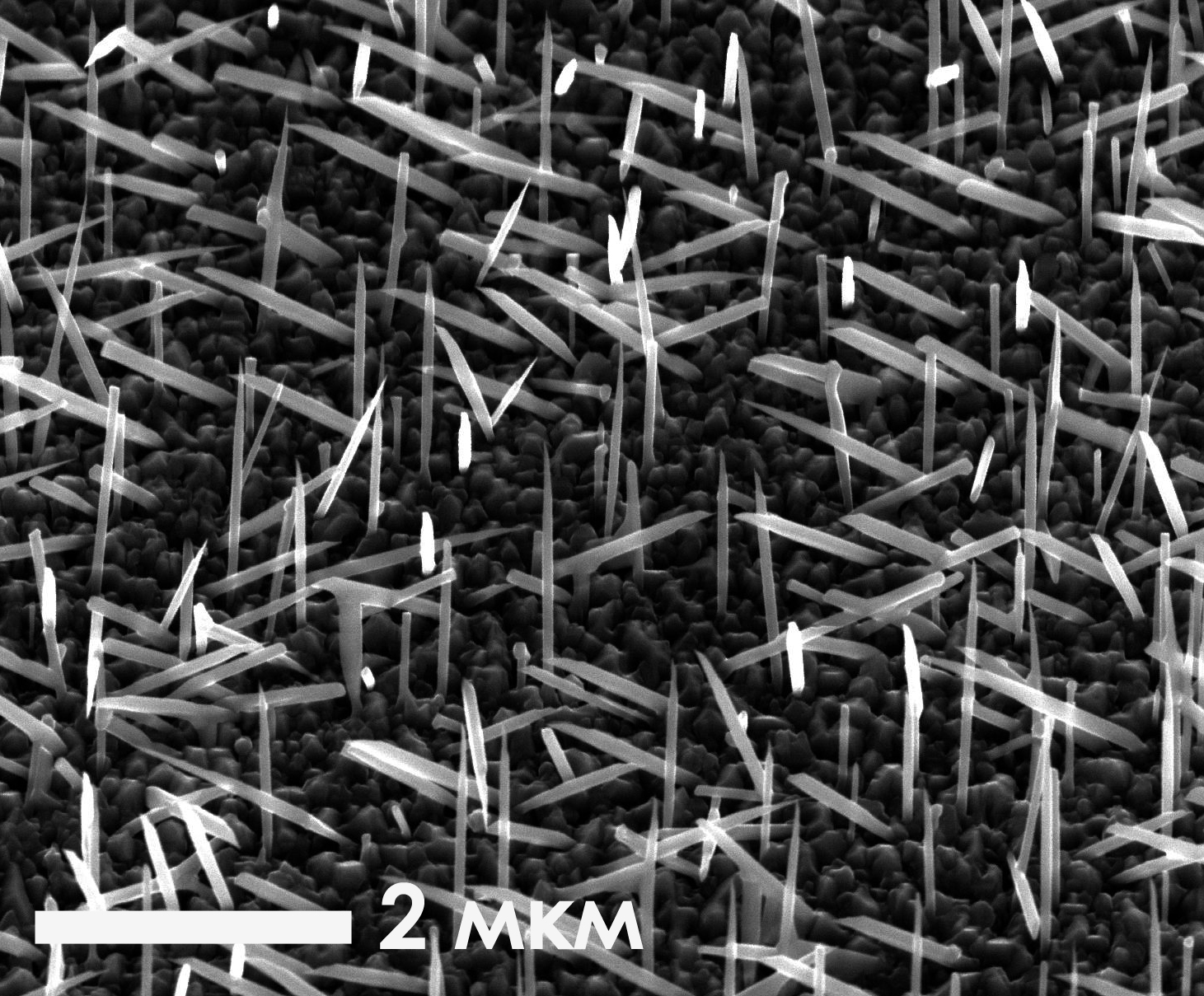 InP нановискеры вырашенные на Si подложке